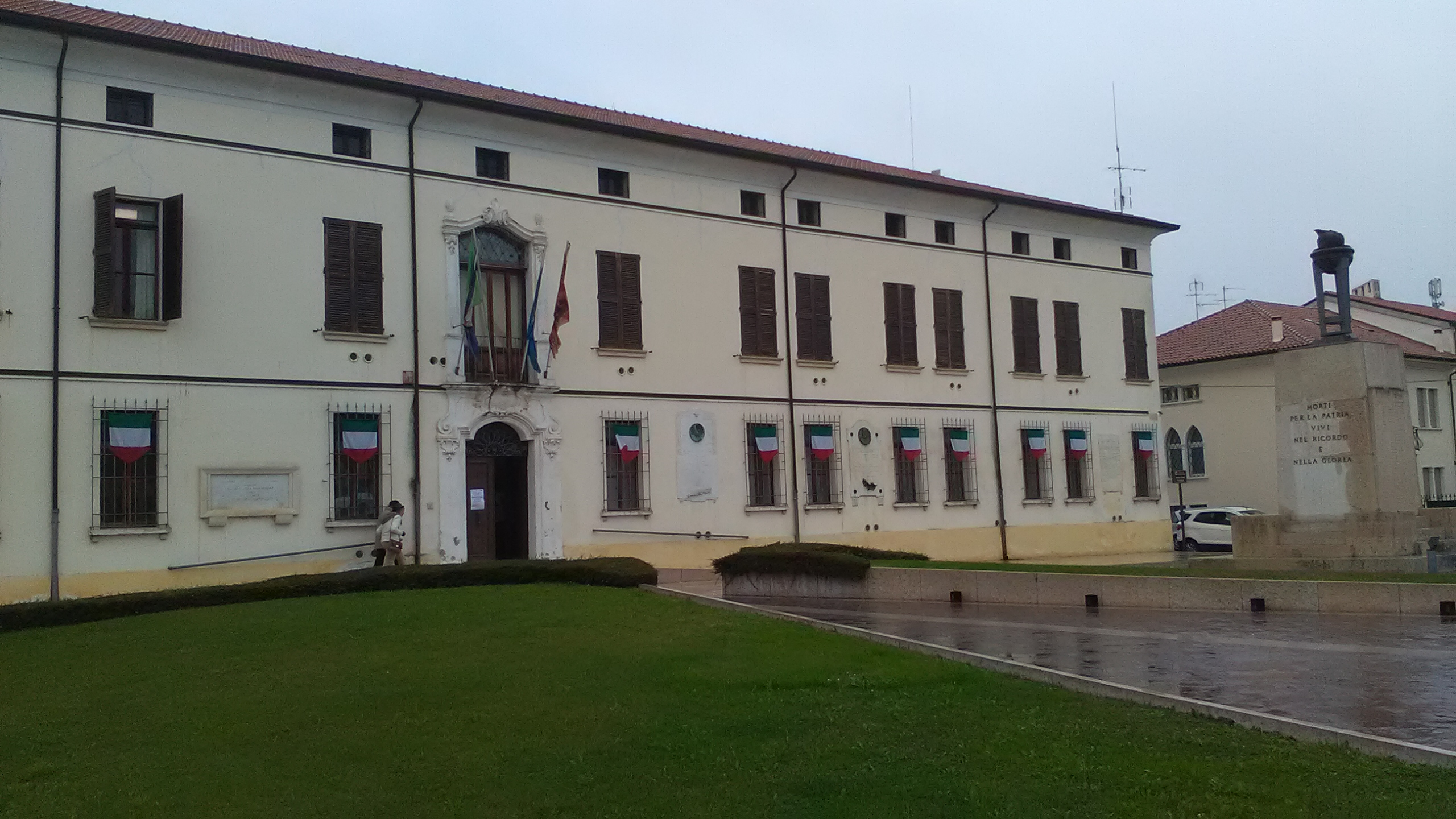 Municipio di Castelmassa